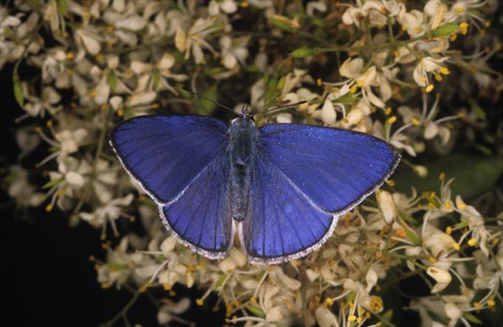 Candalides absimilis edwarsi male